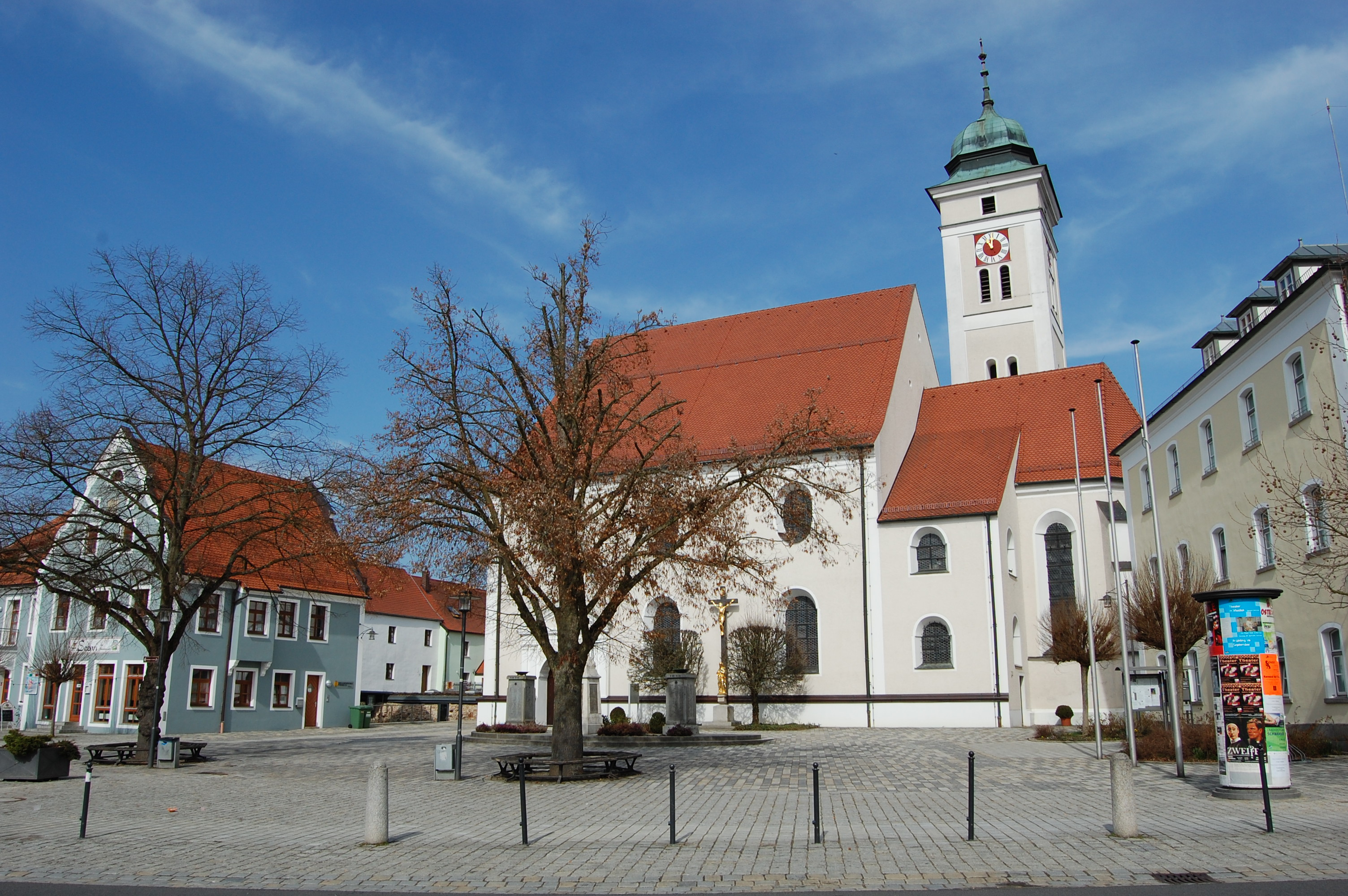 Marktplatz Pfreimd mit Stadtpfarrkirche (2010). Die Stadt Pfreimd liegt am gleichnamigen Fluss Pfreimd, der hier in die Naab mündet.